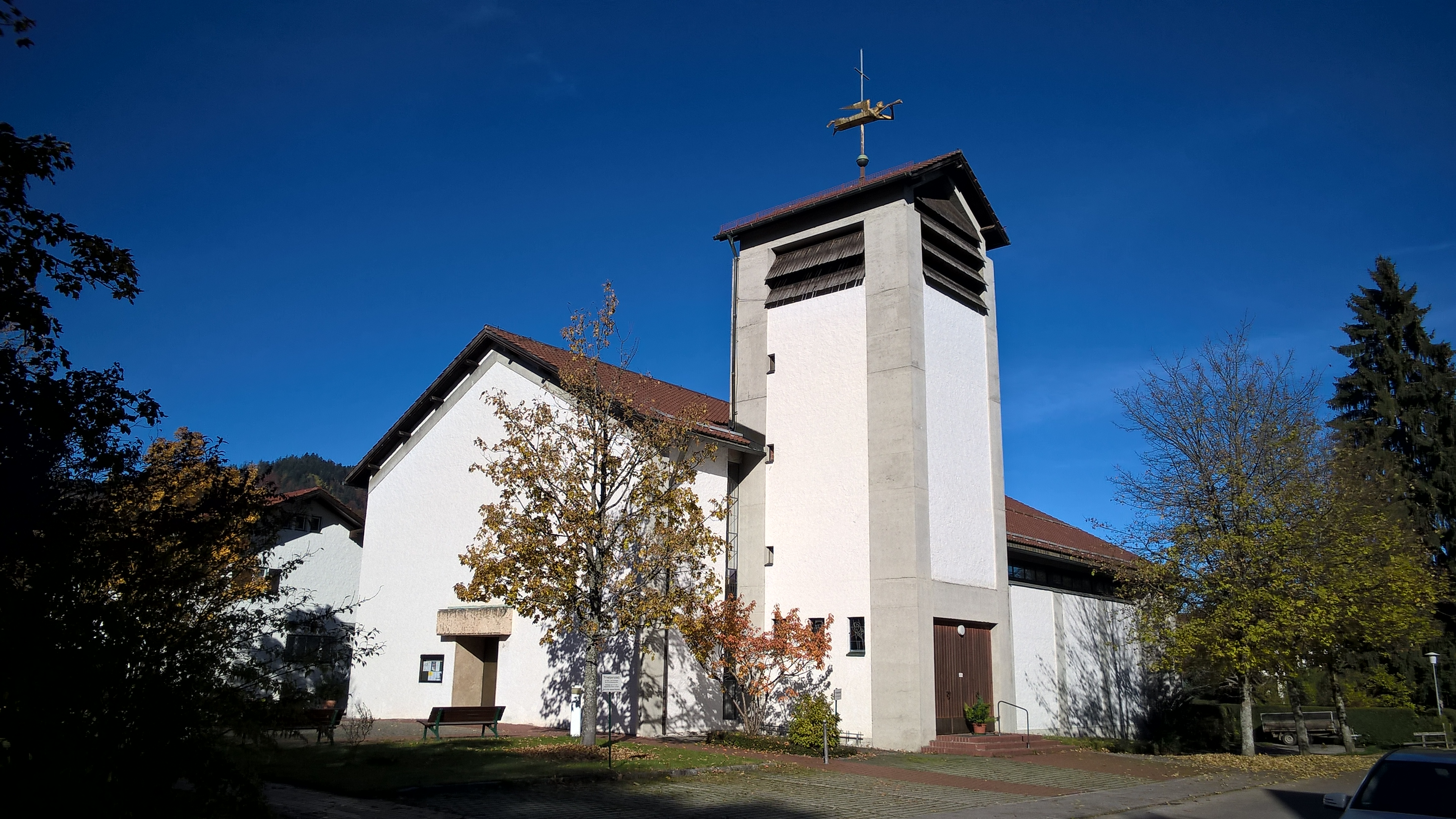 St. Antoniuskirche in Bad Wiessee; Erbaut 1958 von Richard Berchtold aus München und Walter Ehm aus Germering; Schlichter funktionaler Bau mit massivem Turm.